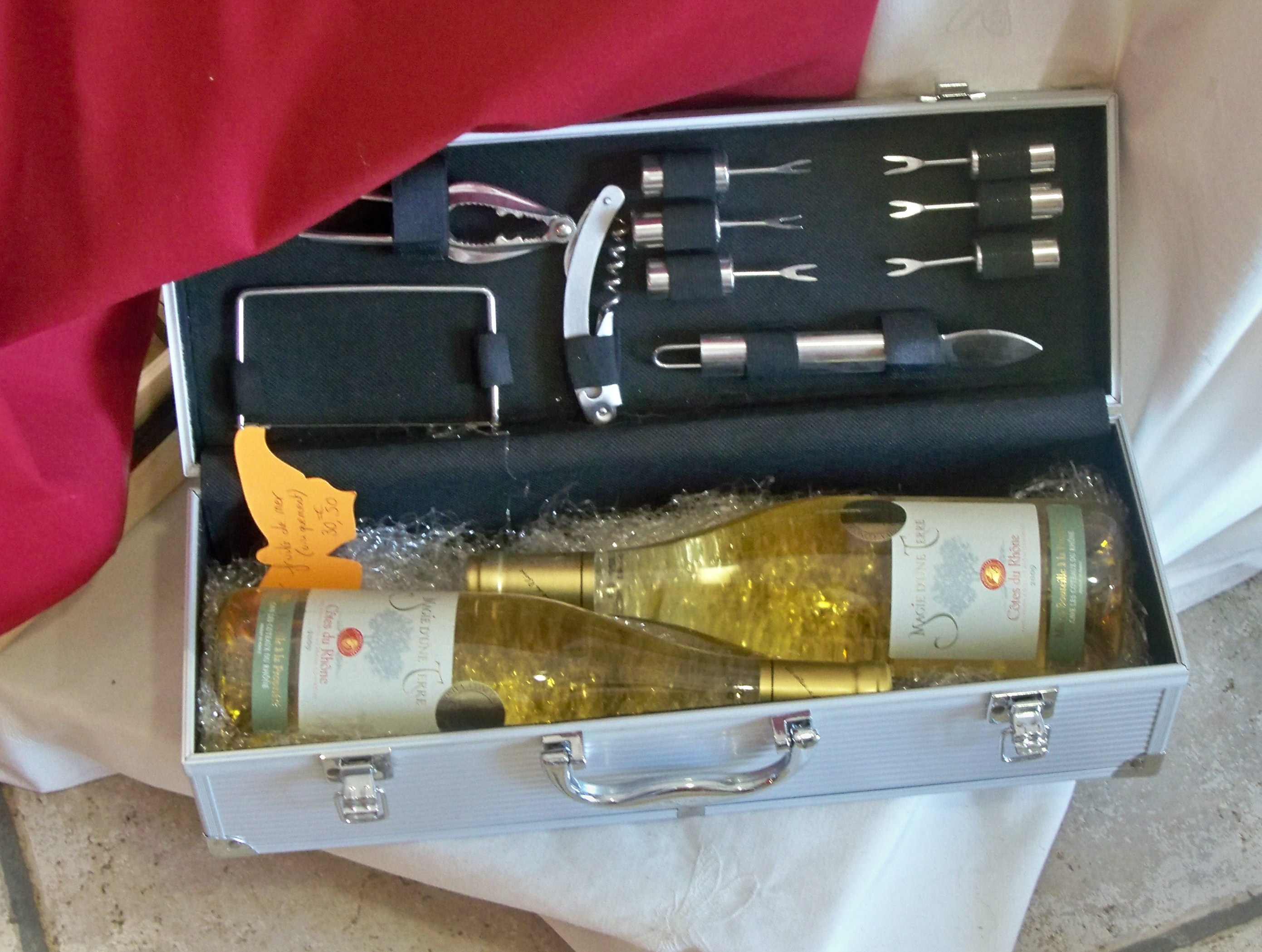 Coffret méditerranéen, spécial fruit de mer à la cave de Sérignan du Comtat, Vaucluse